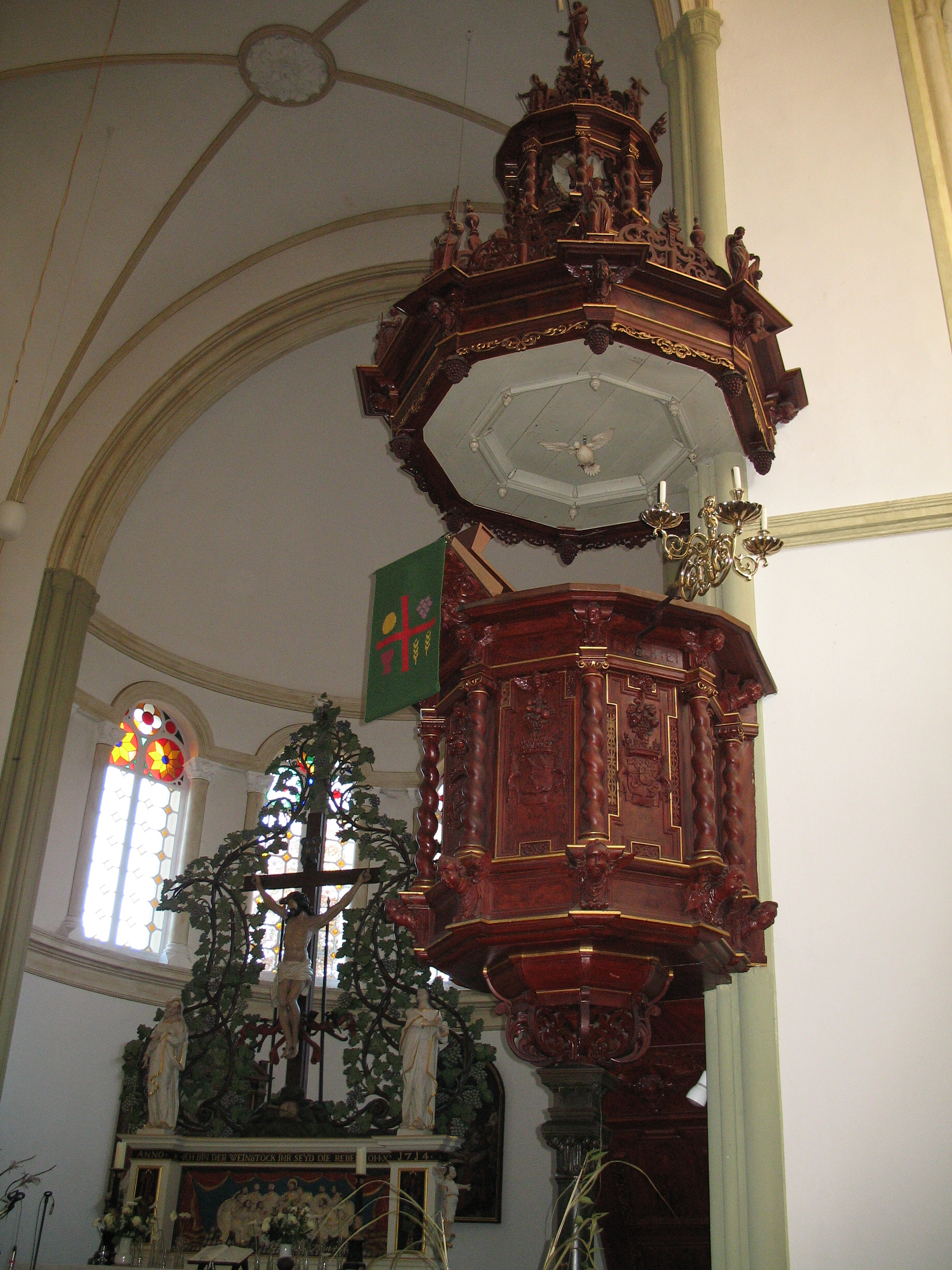 Esens (Kreis Wittmund, Ostfriesland, Niedersachsen), Evangelische Kirche St. Magnus (1848 erbaut), Kanzel von H. Cröpelin, Esens (1674 gestiftet). Links Blick auf den auf 1714 datierten Altaraufsatz. Beide Ausstattungsstücke sind aus dem Vorgänger-Kirchenbau übernommen (Angaben lt. Dehio, Band Bremen/Niedersachsen, München 1992).